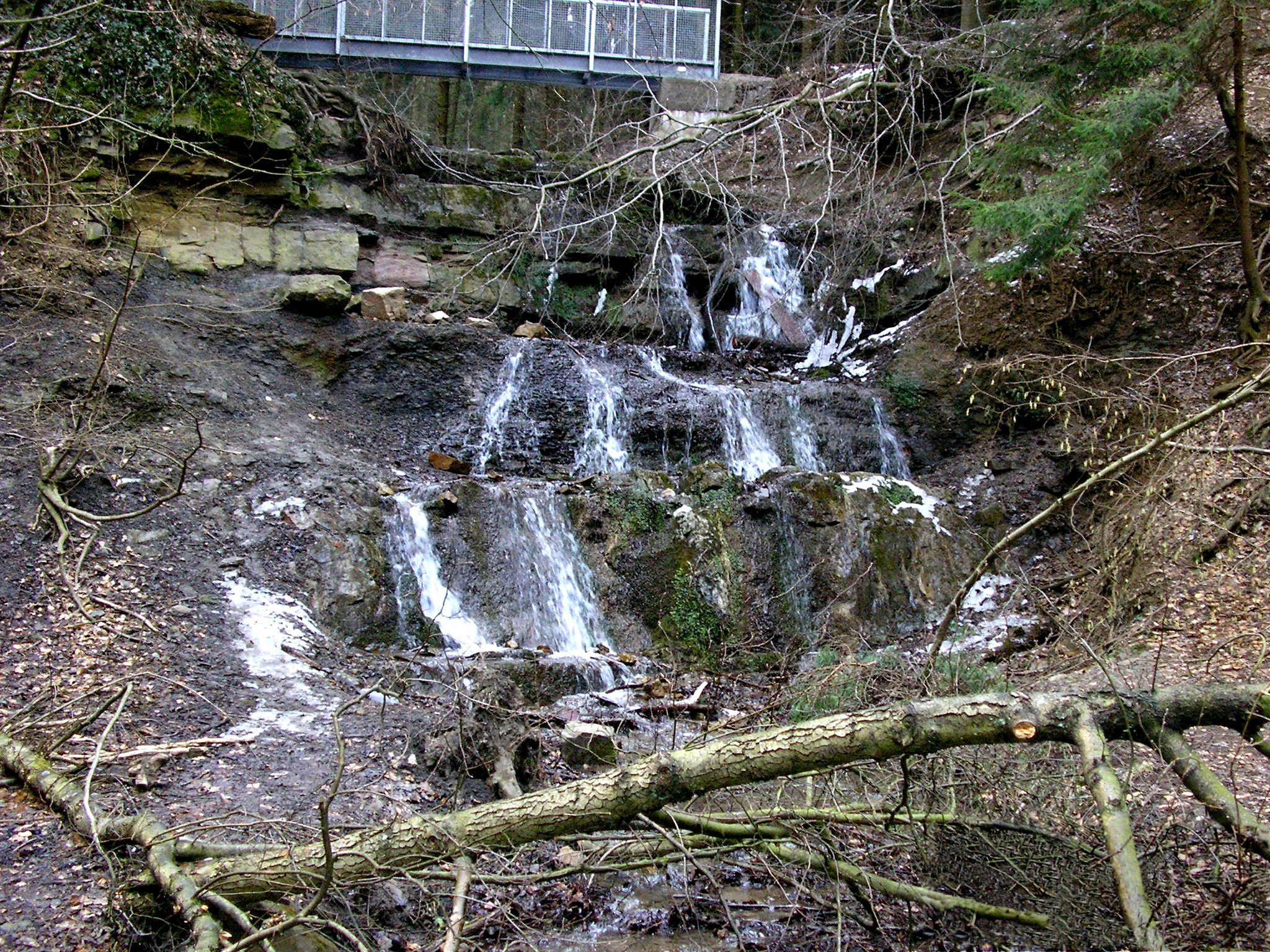 Wasserfall am Grünen See im Wiehengebirge nahe Melle.